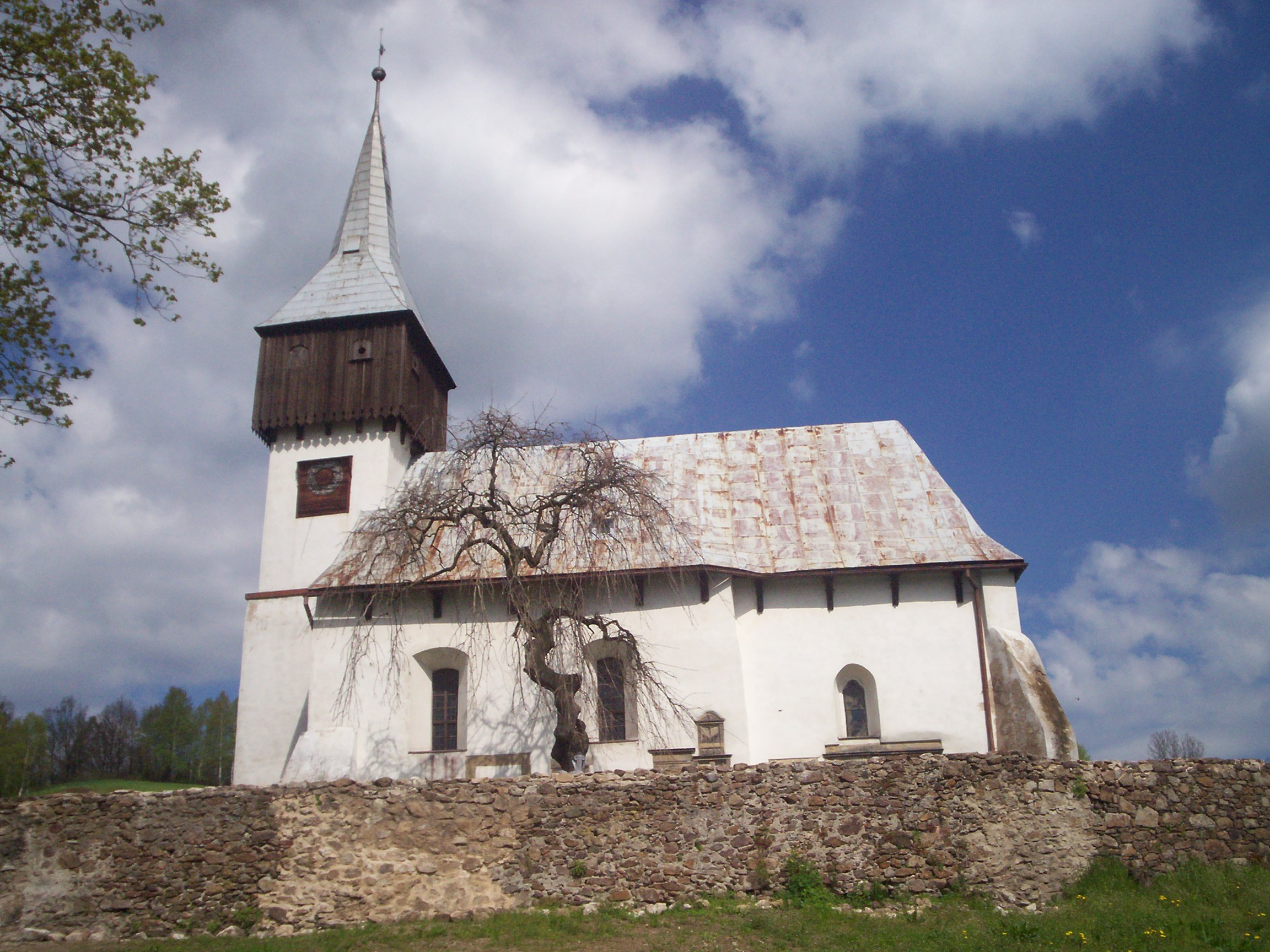 Kościół pw. „Świętej Katarzyny.” w Marciszowie.